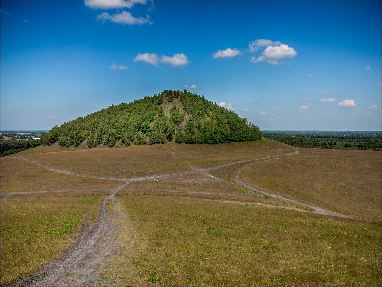 Terril van de voormalige kolenmijn 'André Dumont' van Waterschei